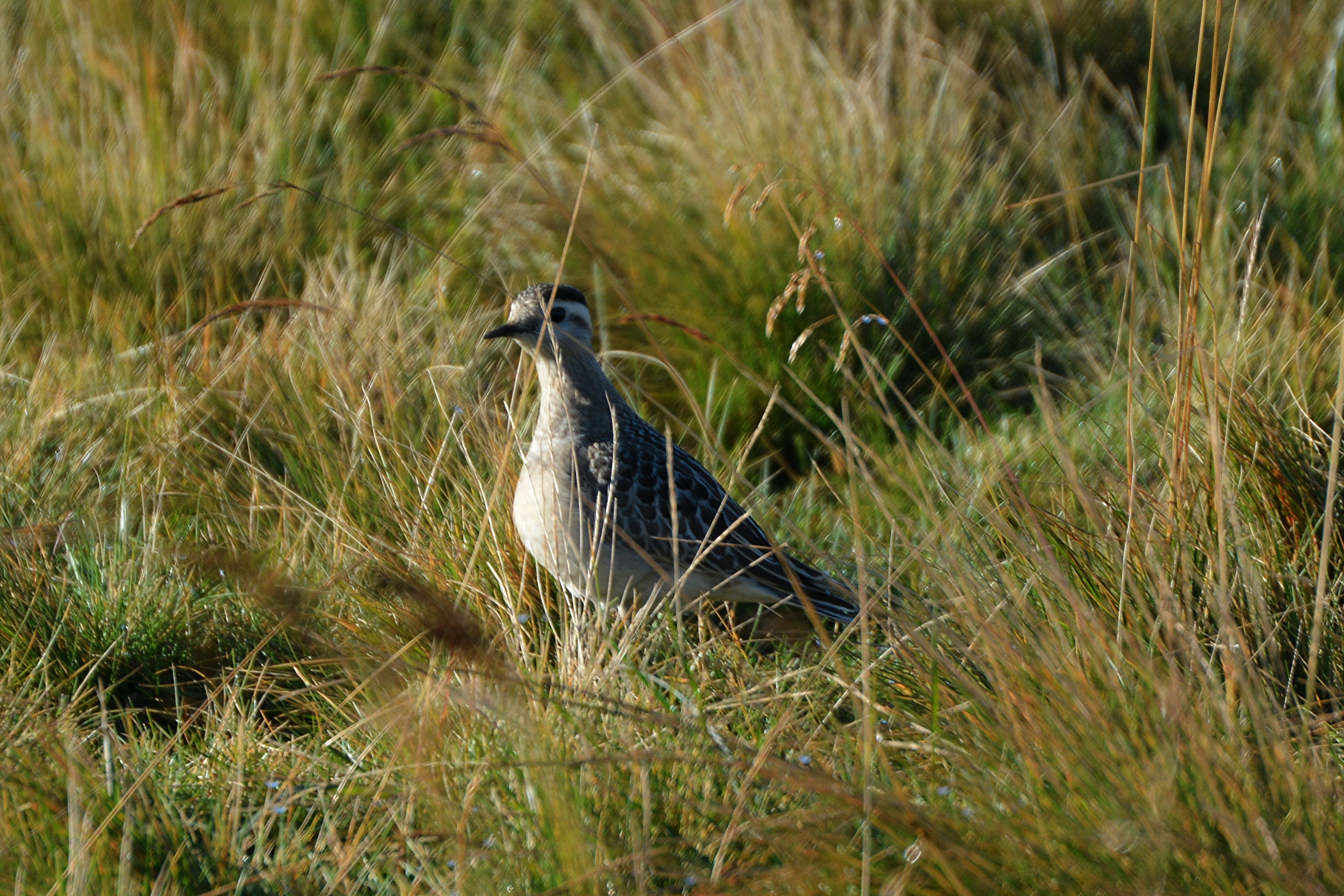 Mornellregenpfeifer im Schlichtkleid während des Herbstzugs